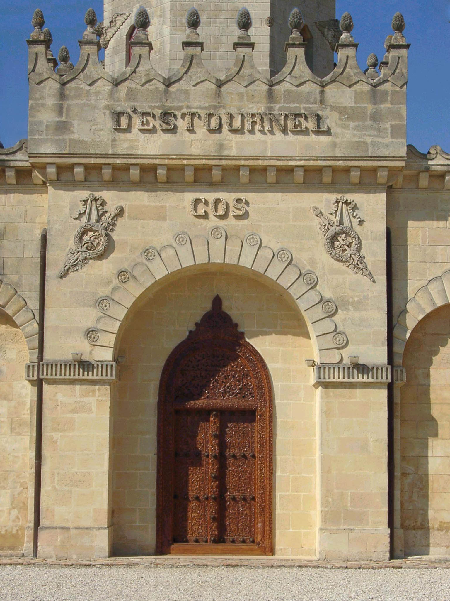 Portal des Fasskellers von Cos d'Estournel